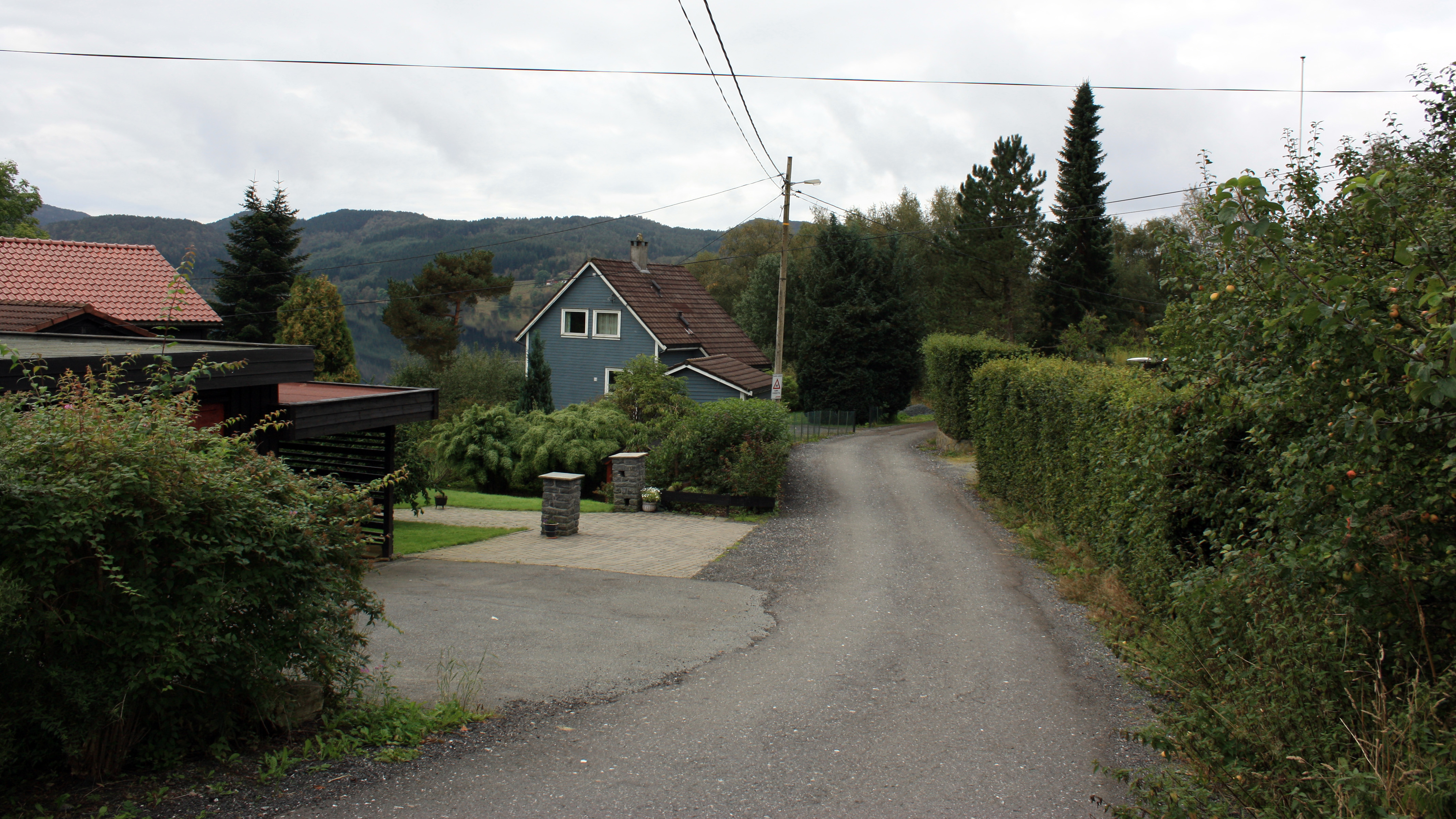 Sandven Hageby, Fana, Bergen.